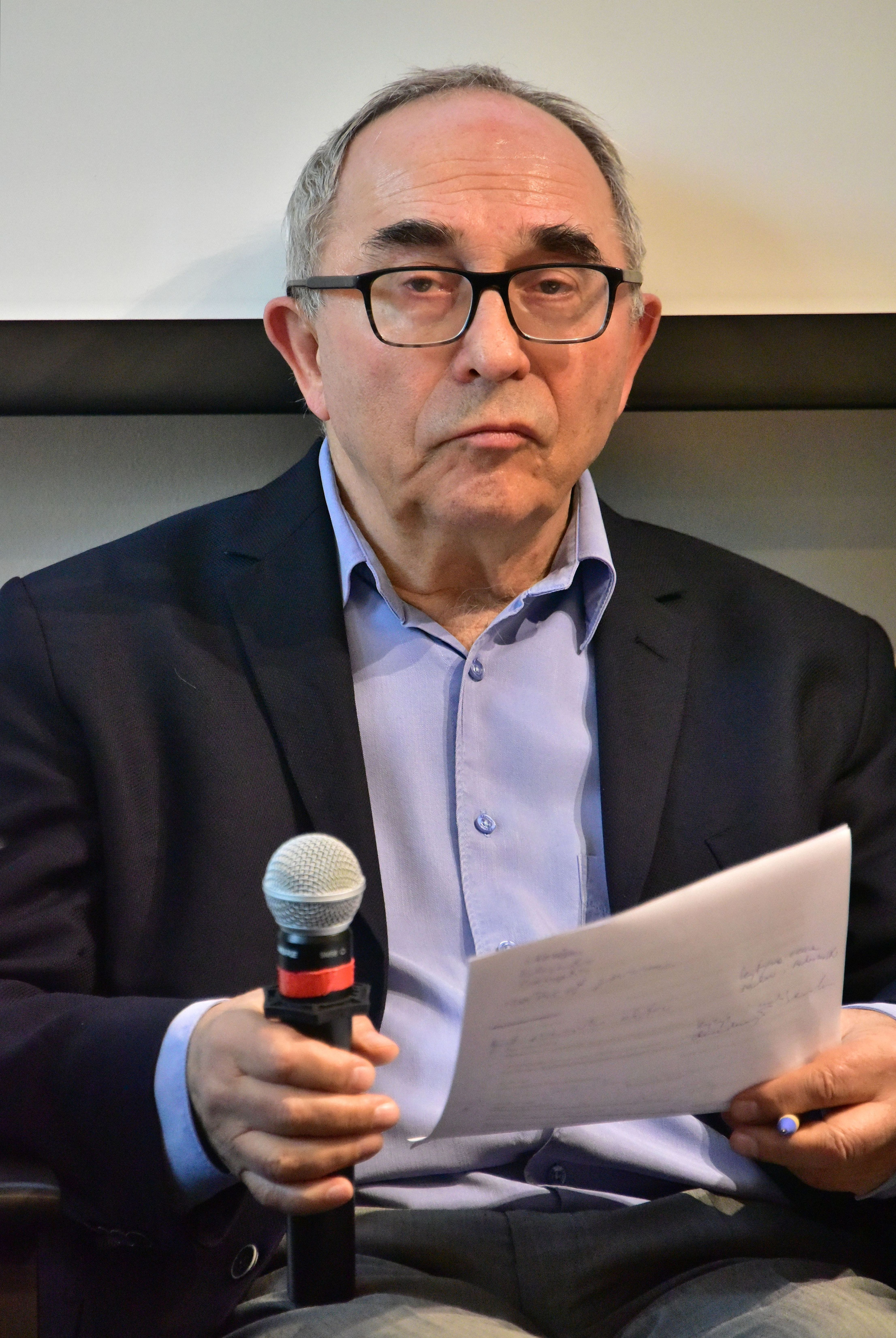 Aleksander Smolar, prezes Fundacji Batorego